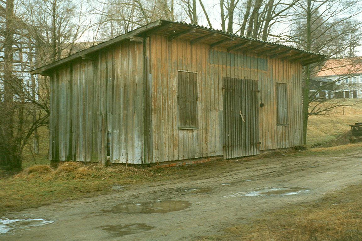 ehemalige Wartehalle an der Station Oberehrenberg (Wartehalle steht heute im Museumsbahnhof Lohsdorf